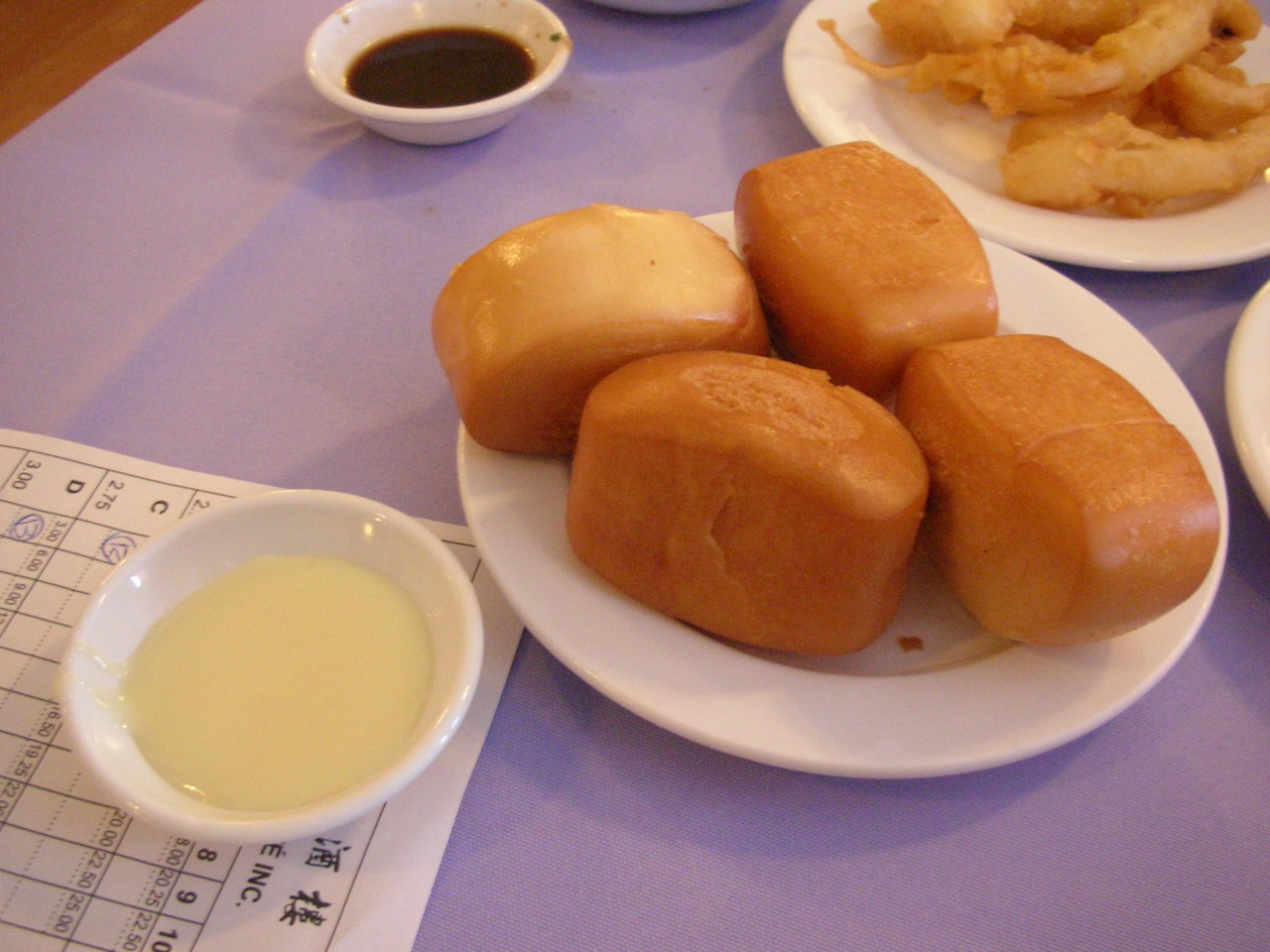 Deep fried mantou.